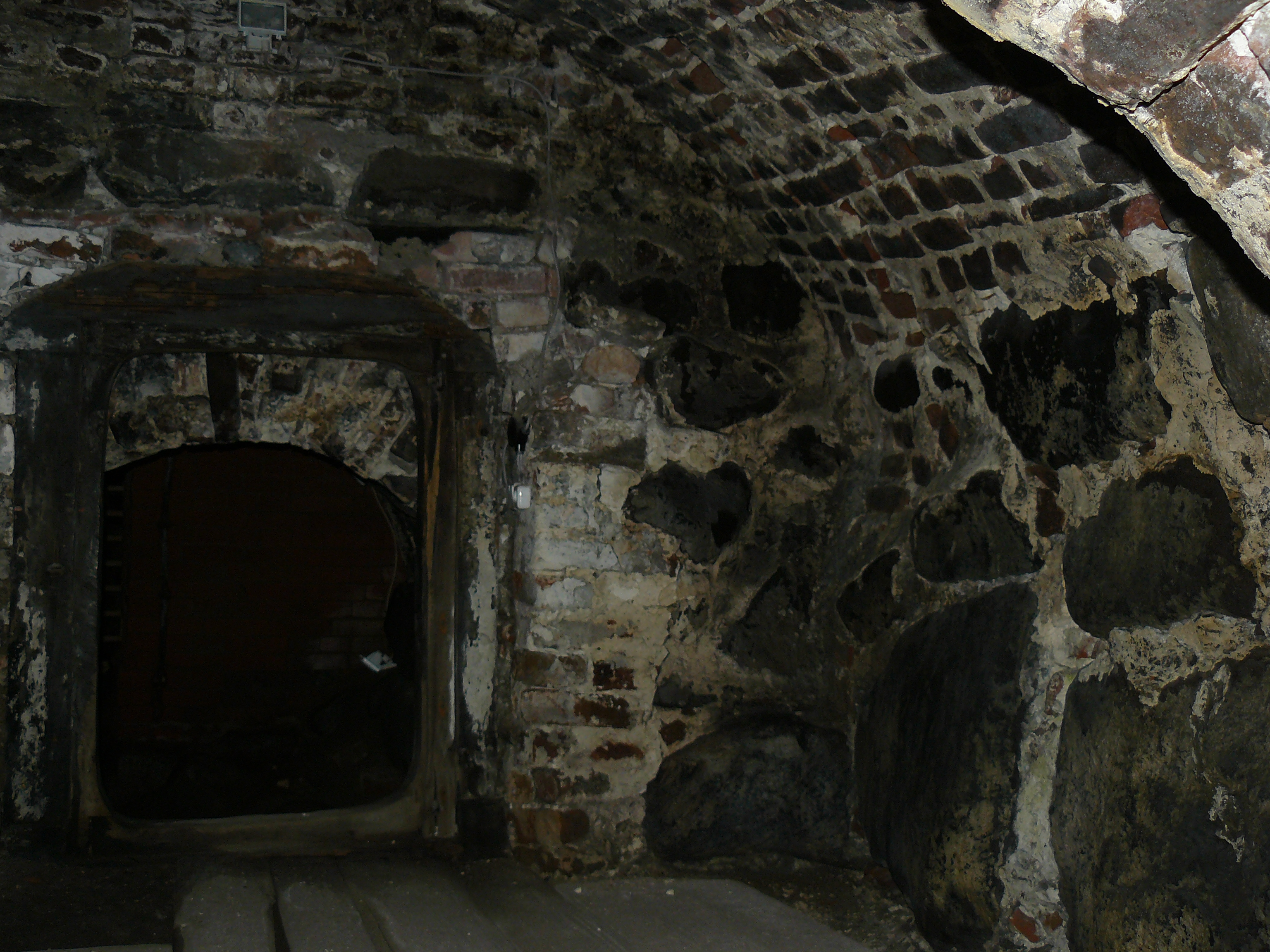 В'язнична камера кошового отамана (фото з вікна камери)